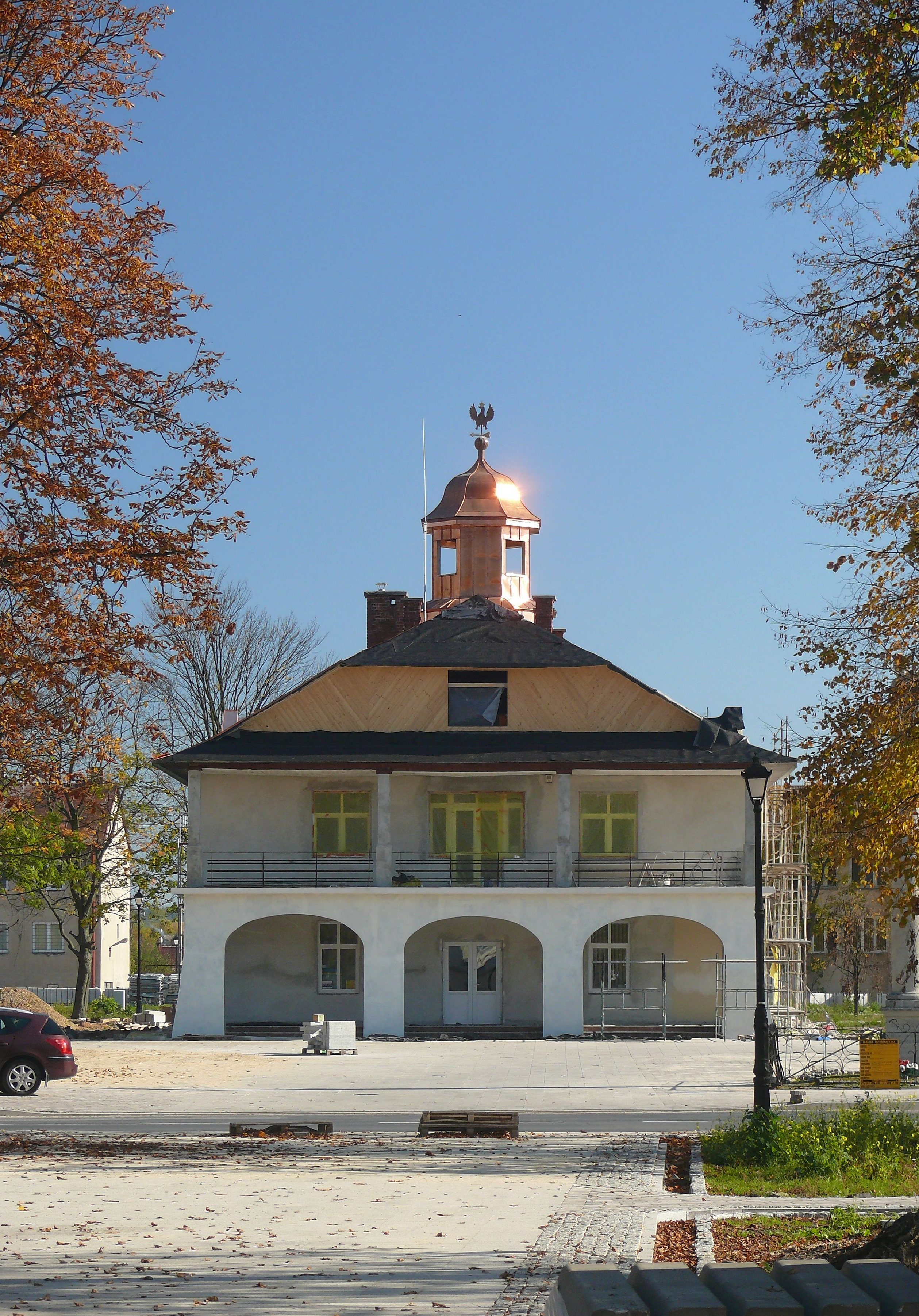 Narol, Rynek 1 - ratusz, XIX w., gruntownie odnowiony w 2012 r. (zabytek nr A-461 z 21.01.2011)